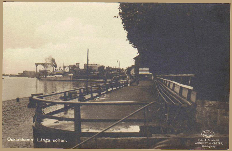 Långa soffan i Oskarshamn. Troligen 1920-30-tal.